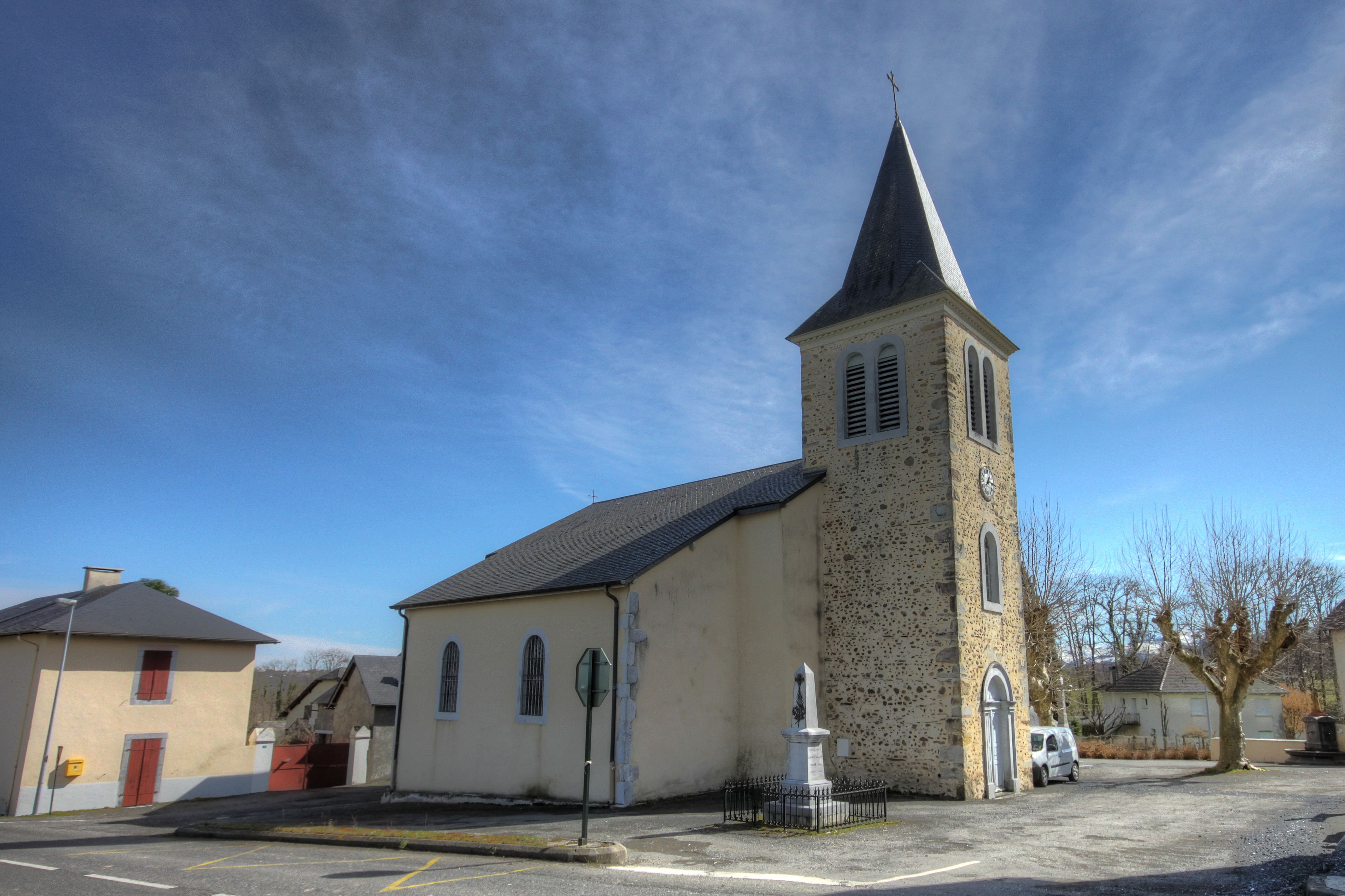 L'église Saint-Sébastien à Labatmale dans les Pyrénées-Atlantiques